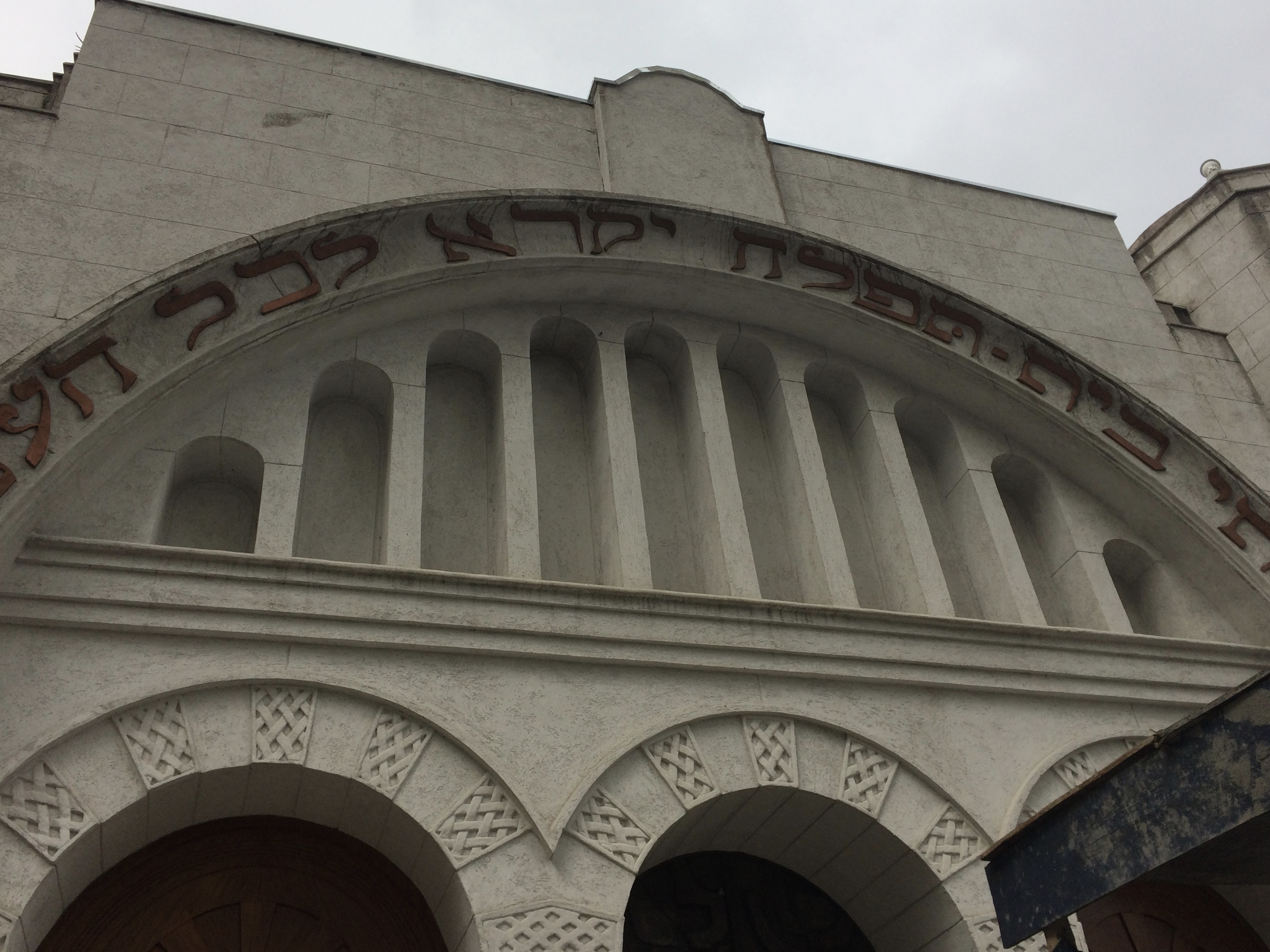 Entrada Principal do Museu Judaico de São Paulo em obras, Rua Martinho Prado, São Paulo (SP), Brasil